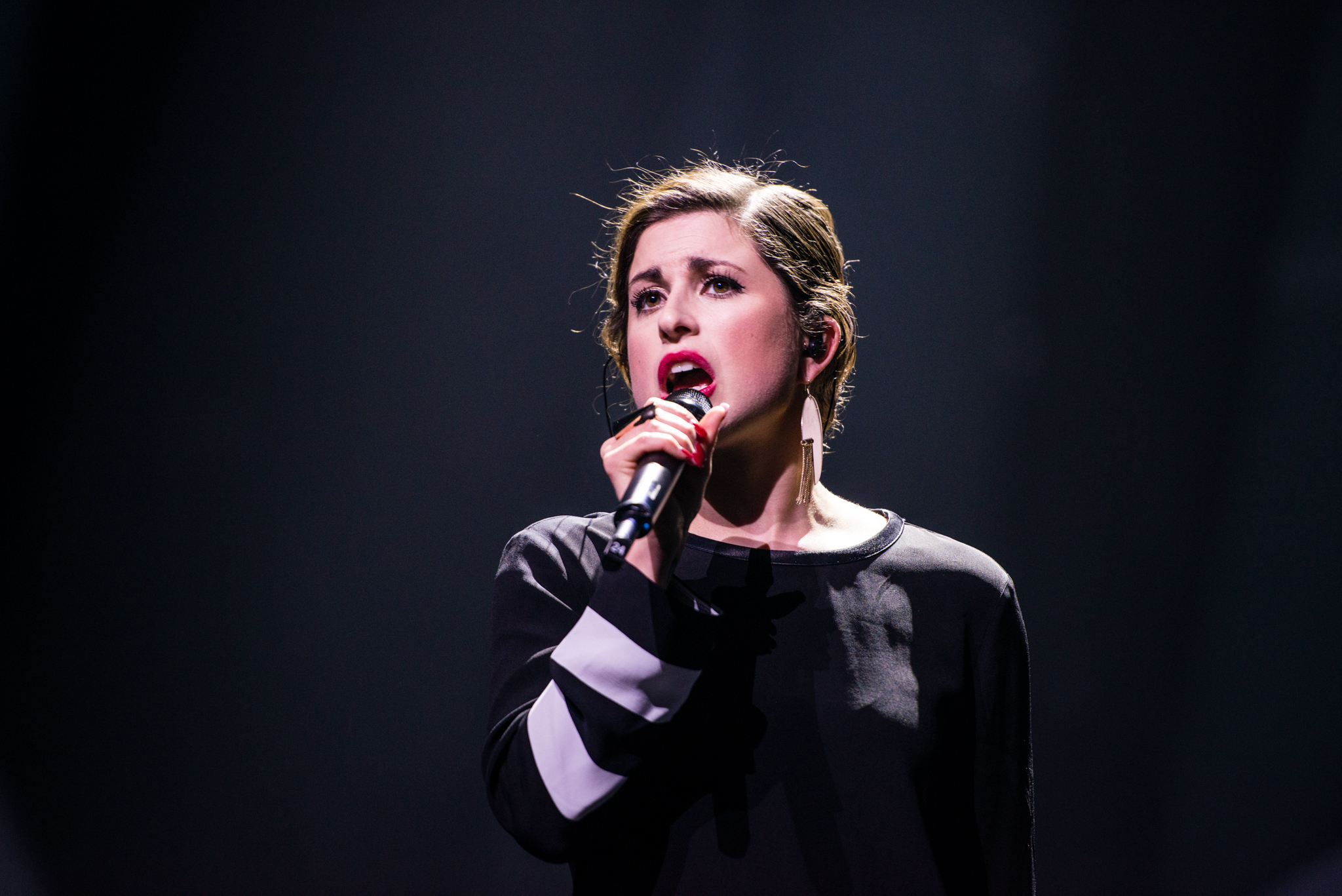 'Eurovision Song Contest 2015 - Unser Song für Österreich': 'Ann Sophie'